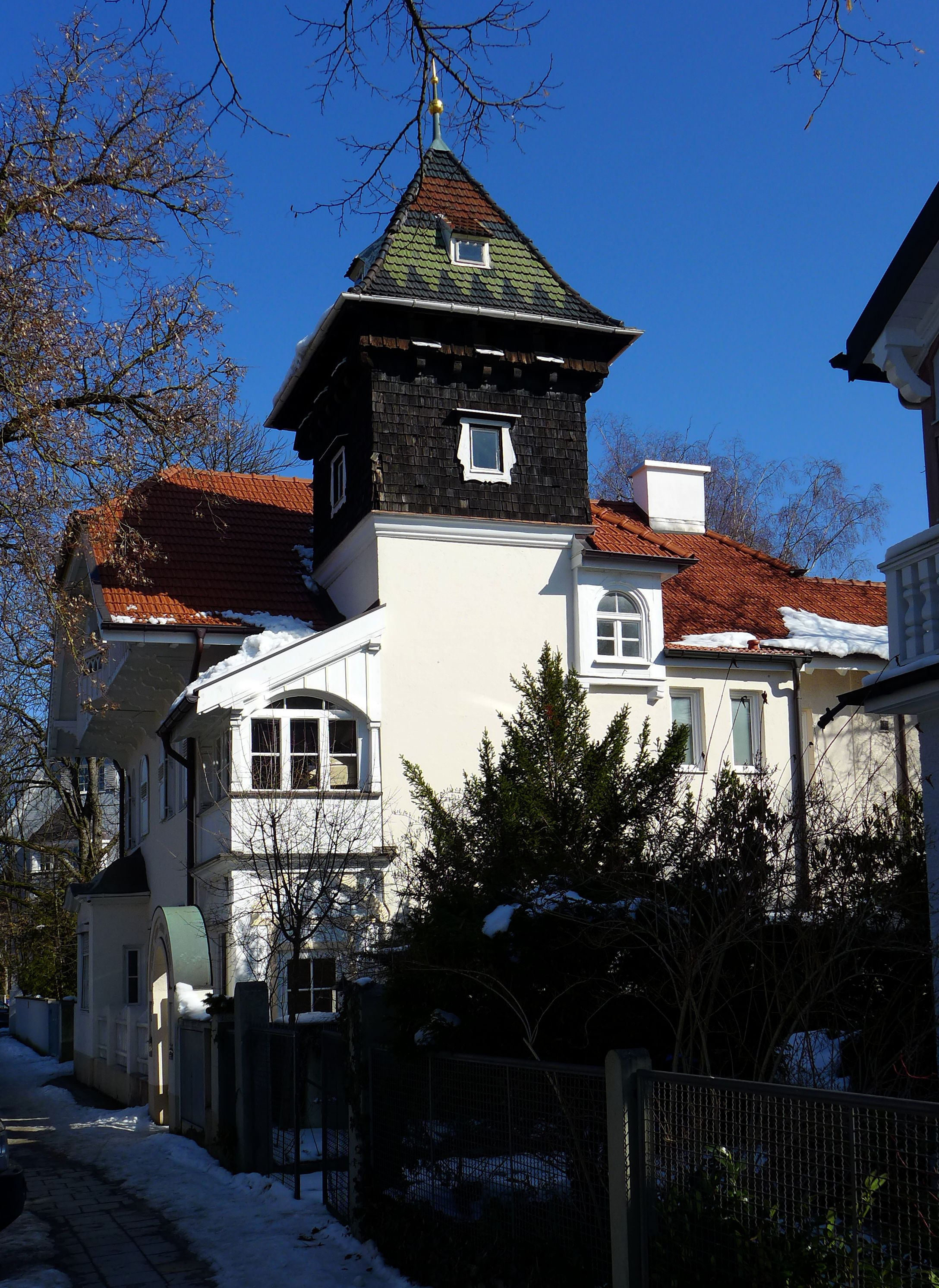 August-Exter-Straße 34, München